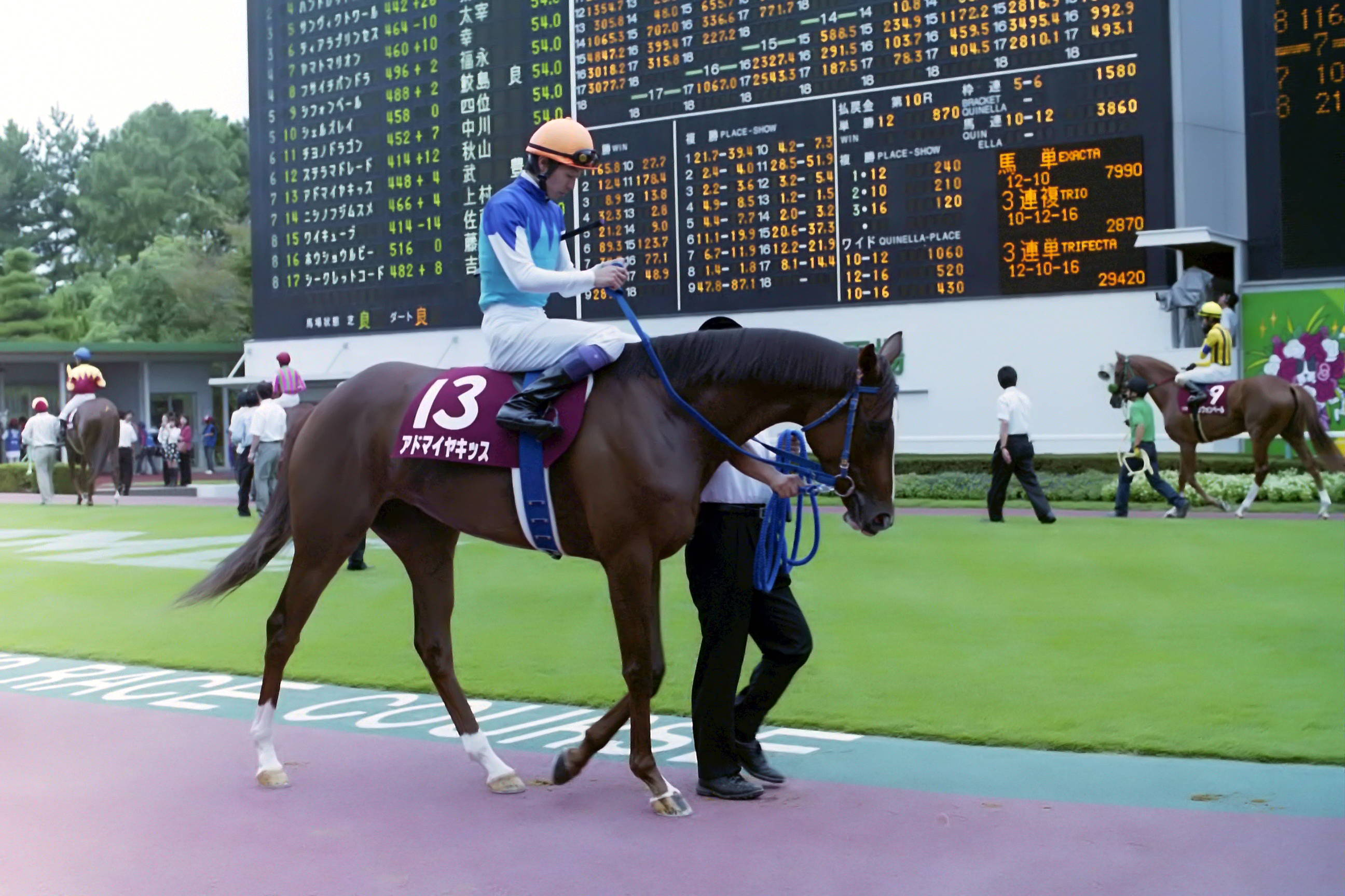 アドマイヤキッス